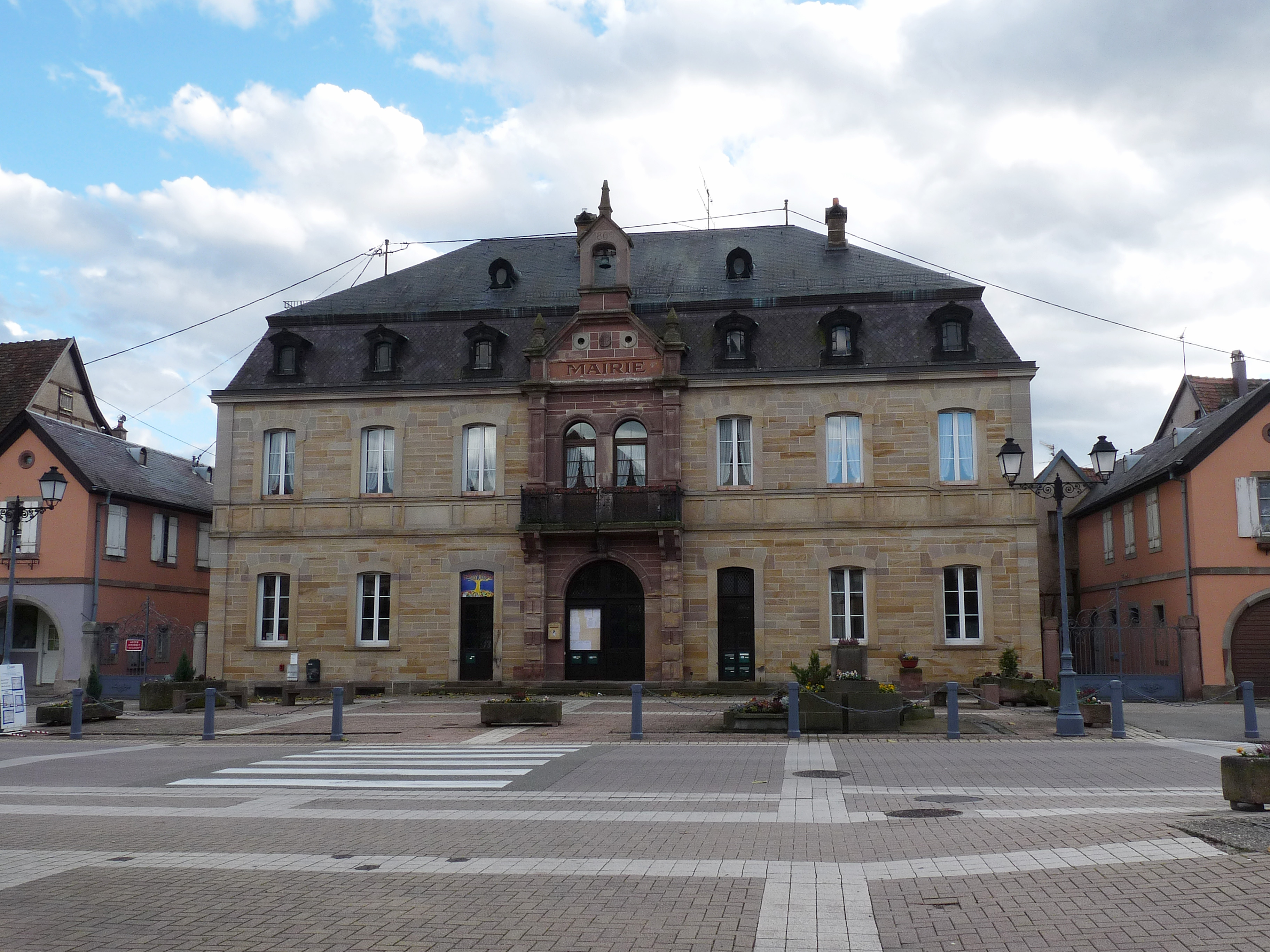 Gertwiller (Bas-Rhin) : mairie (1869)